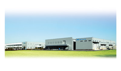 エー・アンド・デイ 開発・技術センター外観